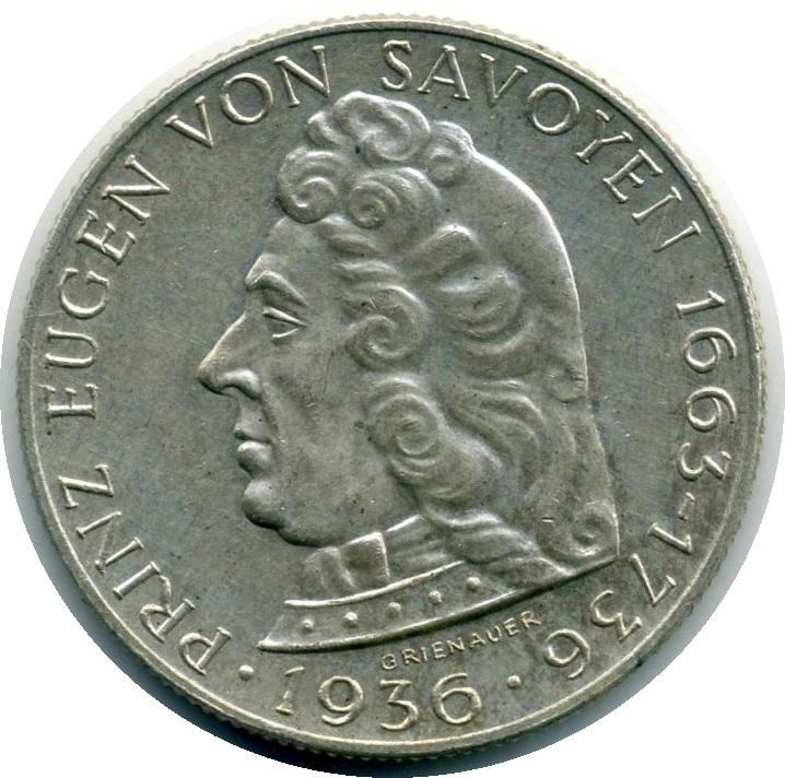 Bildseite der 2-Schilling-Gedenkmünze aus dem Jahr 1936